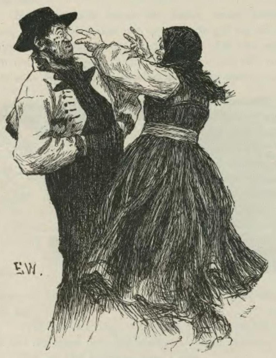 Sagobok för barn